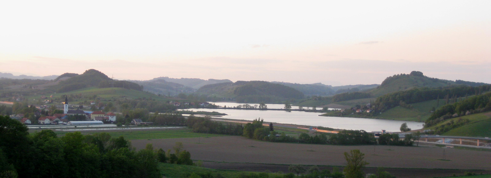 Pernica, village in Slovenia